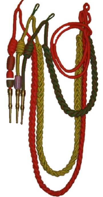 Fourragère du RICM (Régiment d'infanterie-chars de marine)